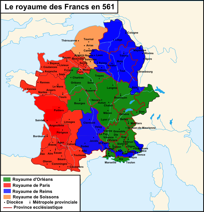 Le royaume des Francs en 561.